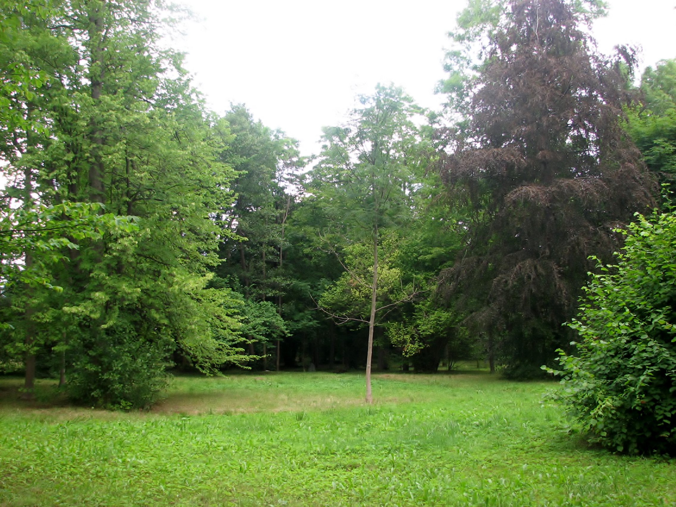 Vaade Kärdla rannapargile